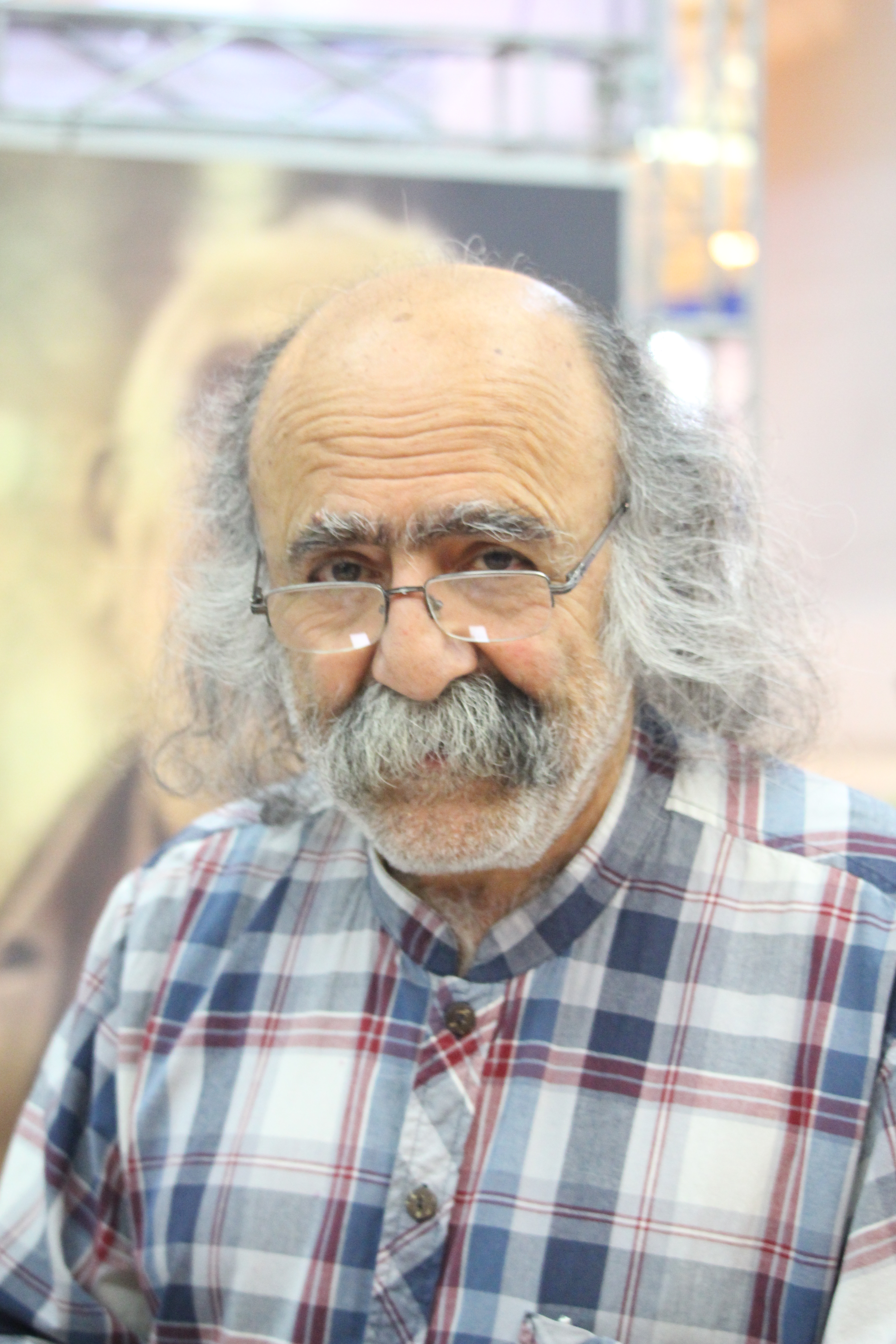 کیوان صمیمی Keyvan Samimi